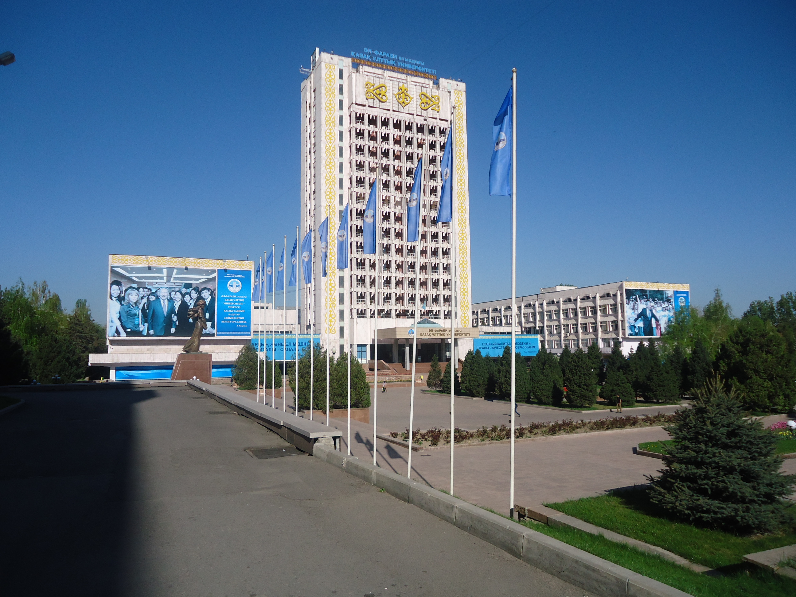 Turkic Wikimedia Conference, 20-21 April 2012, Almaty, Kazakhstan